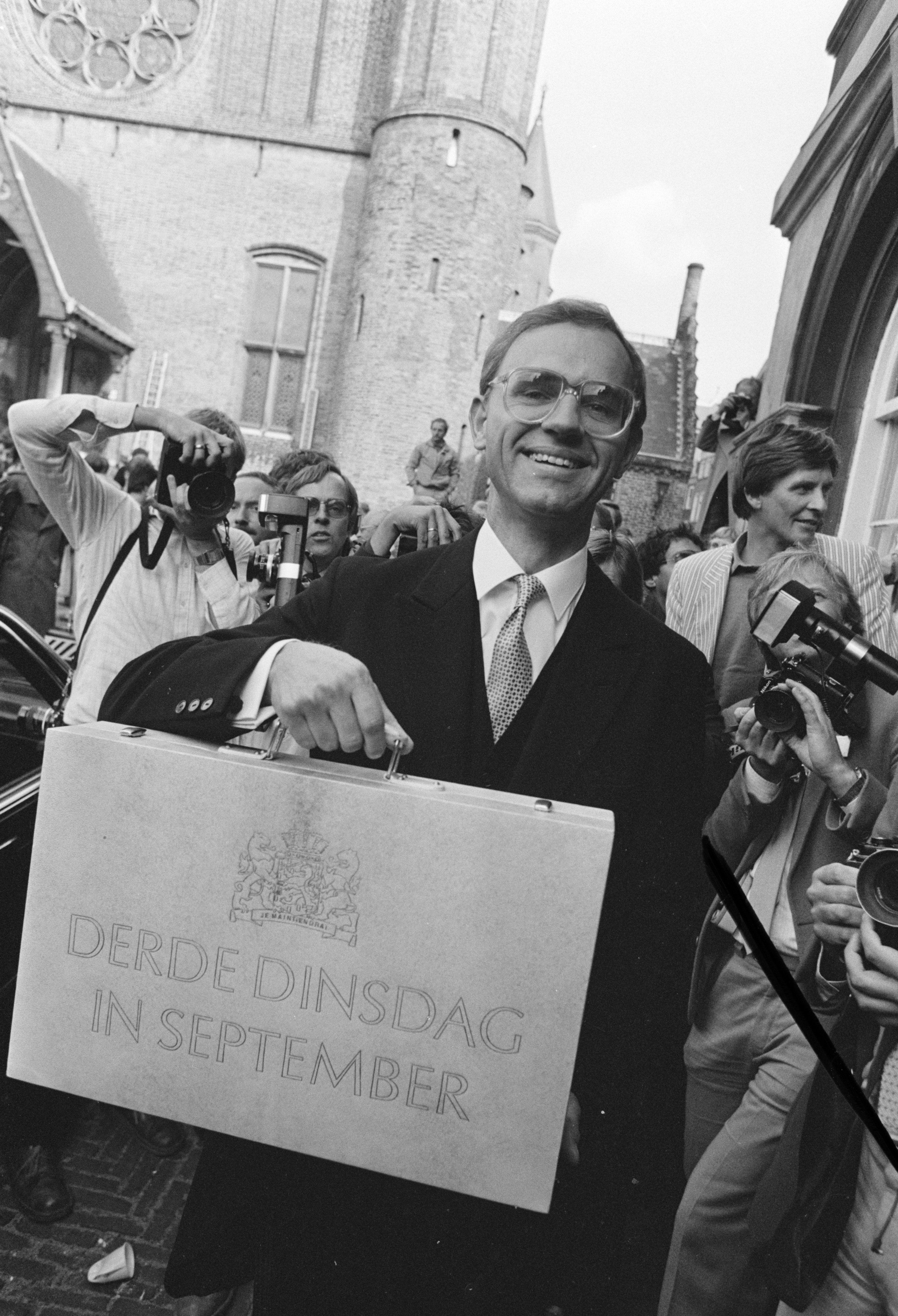 Nationaal Archief Beschrijving: Prinsjesdag 1983, minister Ruding (Financien) met miljardenkoffertje op Binnenhof Datum: 20 september 1983 Bestanddeelnummer NL-HaNA_Anefo_932-7070 Vervaardiger: Bogaerts, Rob / Anefo URL: Voor meer informatie over het Nationaal Archief: Voor meer foto's uit deze en andere collecties, bezoek onze Beeldbank:, U kunt ons helpen onze kennis van de fotocollecties te verrijken door tags en commentaren toe te voegen. Herkent u mensen of locaties of heeft u een bijzonder verhaal te vertellen bij één van de foto's, laat dan een reactie achter (als u ingelogd bent bij Flickr) of stuur een mailtje naar